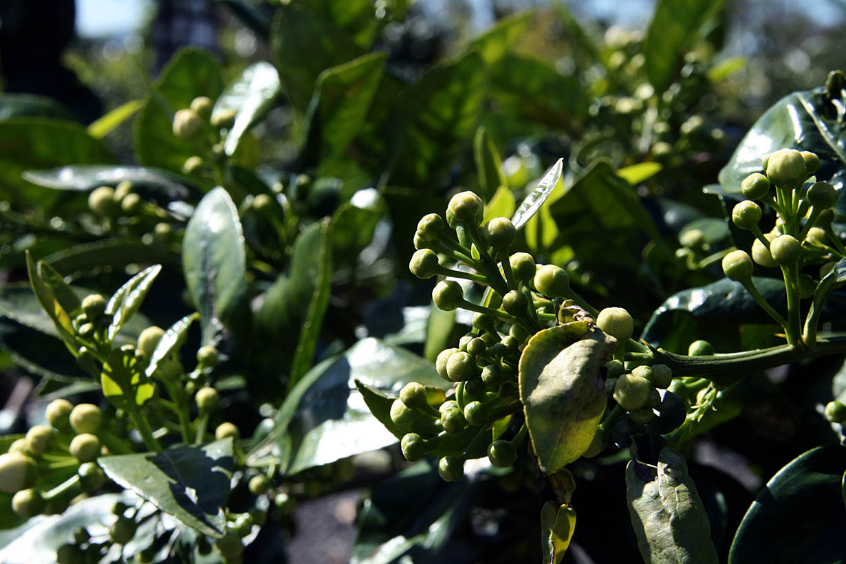 abondance des boutons floraux su Floraison C paradisi année on year 2020